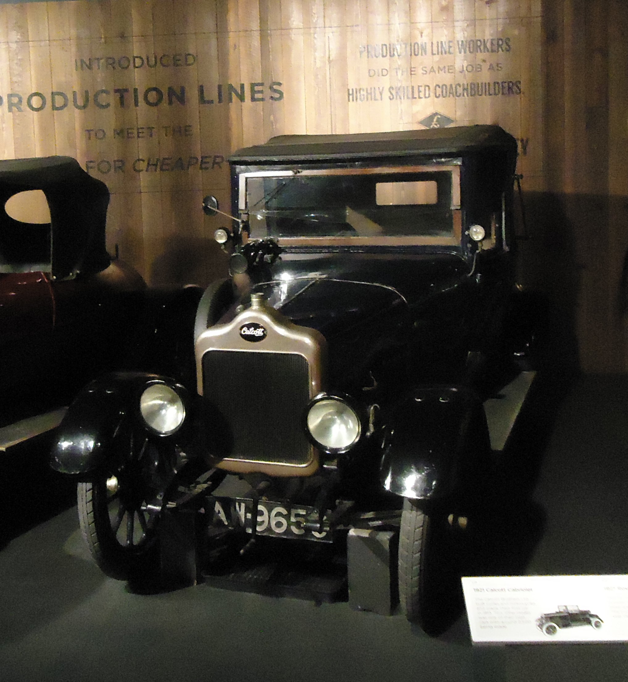 Museo del Transporte de Coventry